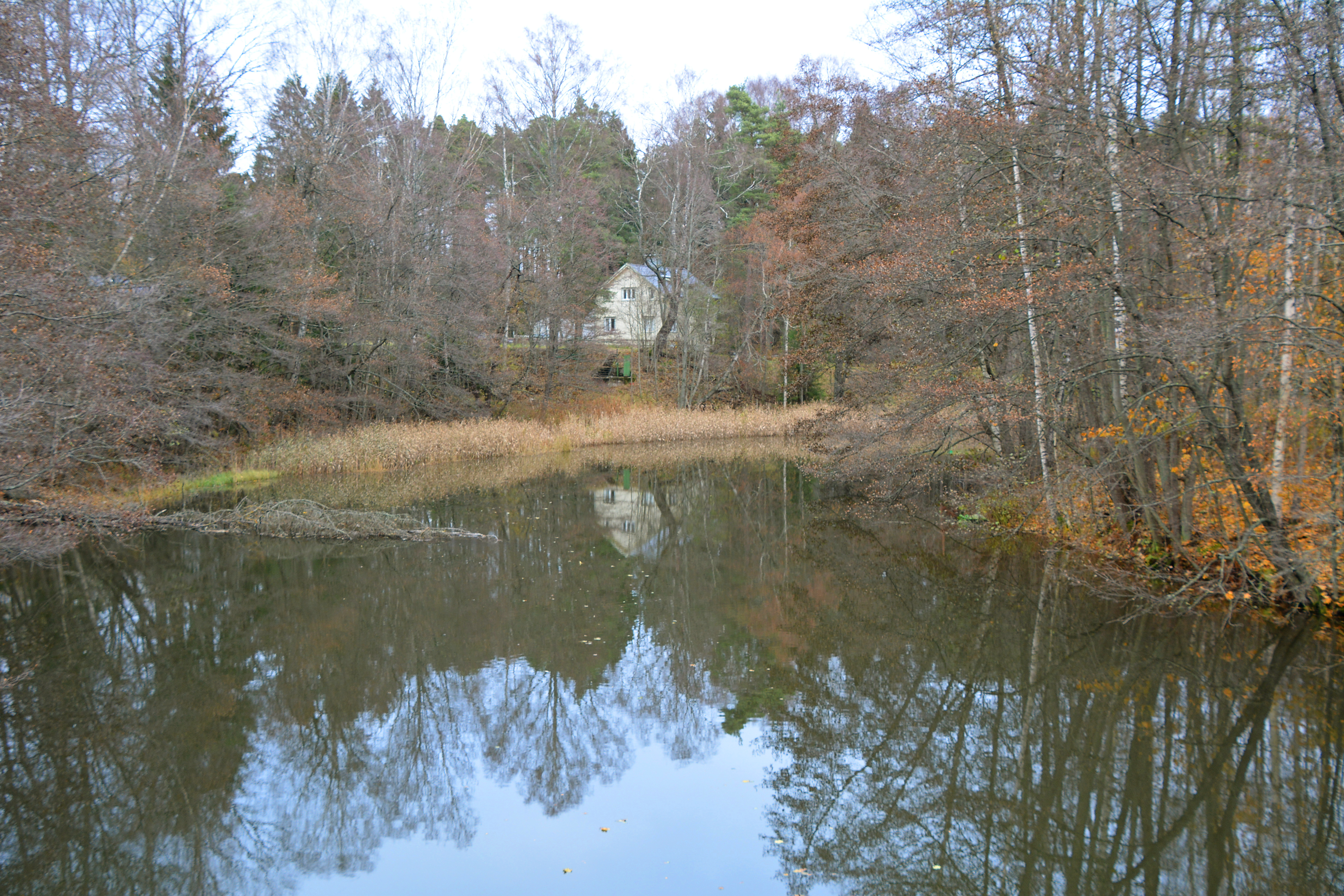 Svartån vid Karis, Nyland, Finland, fotograferad norrut från Landsbron